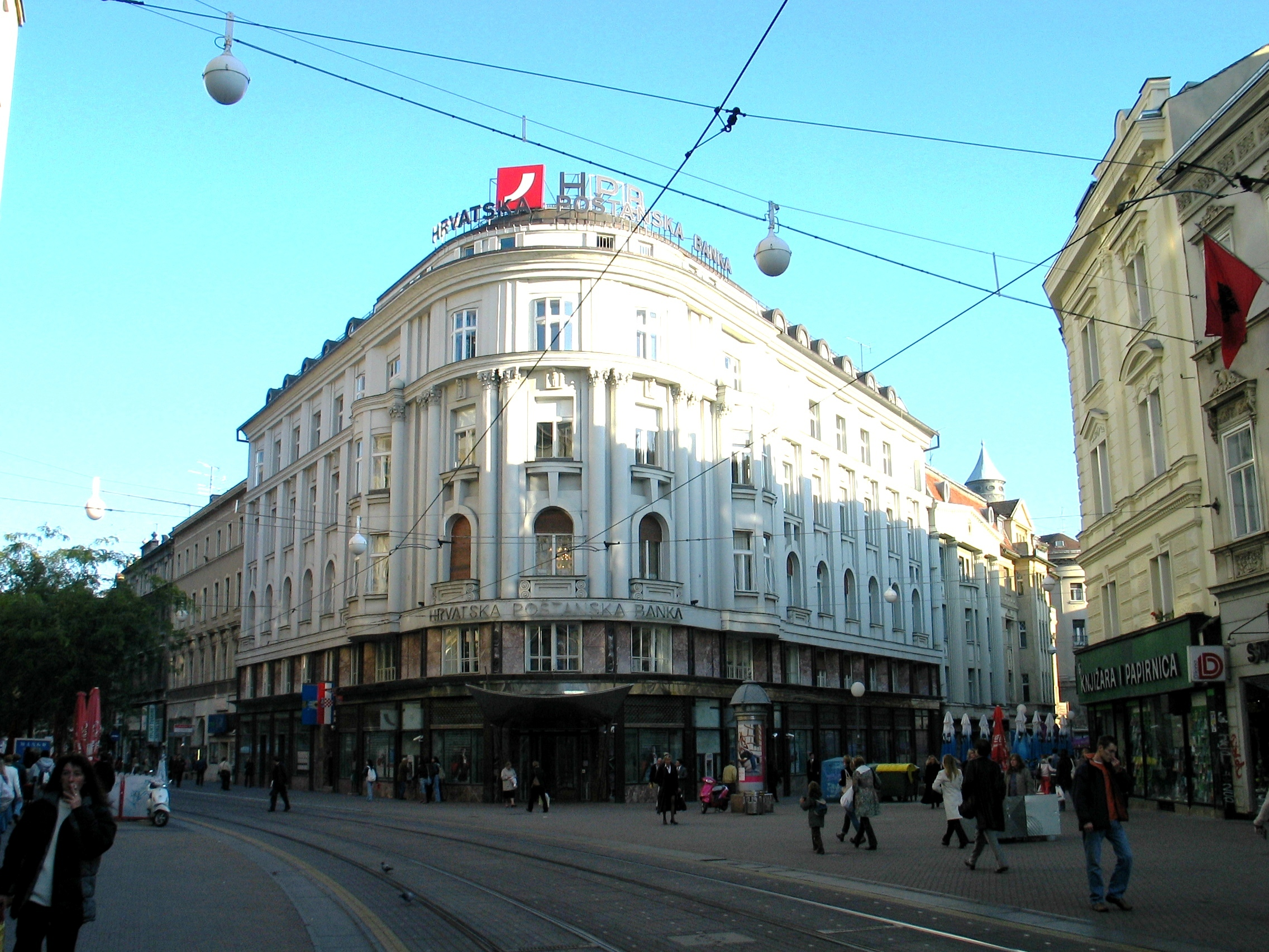 Slavko Benedikt i Aladar Baranyai- Palača Srpske banke 1914. Jurišićeva 4 - Petrinjska 1